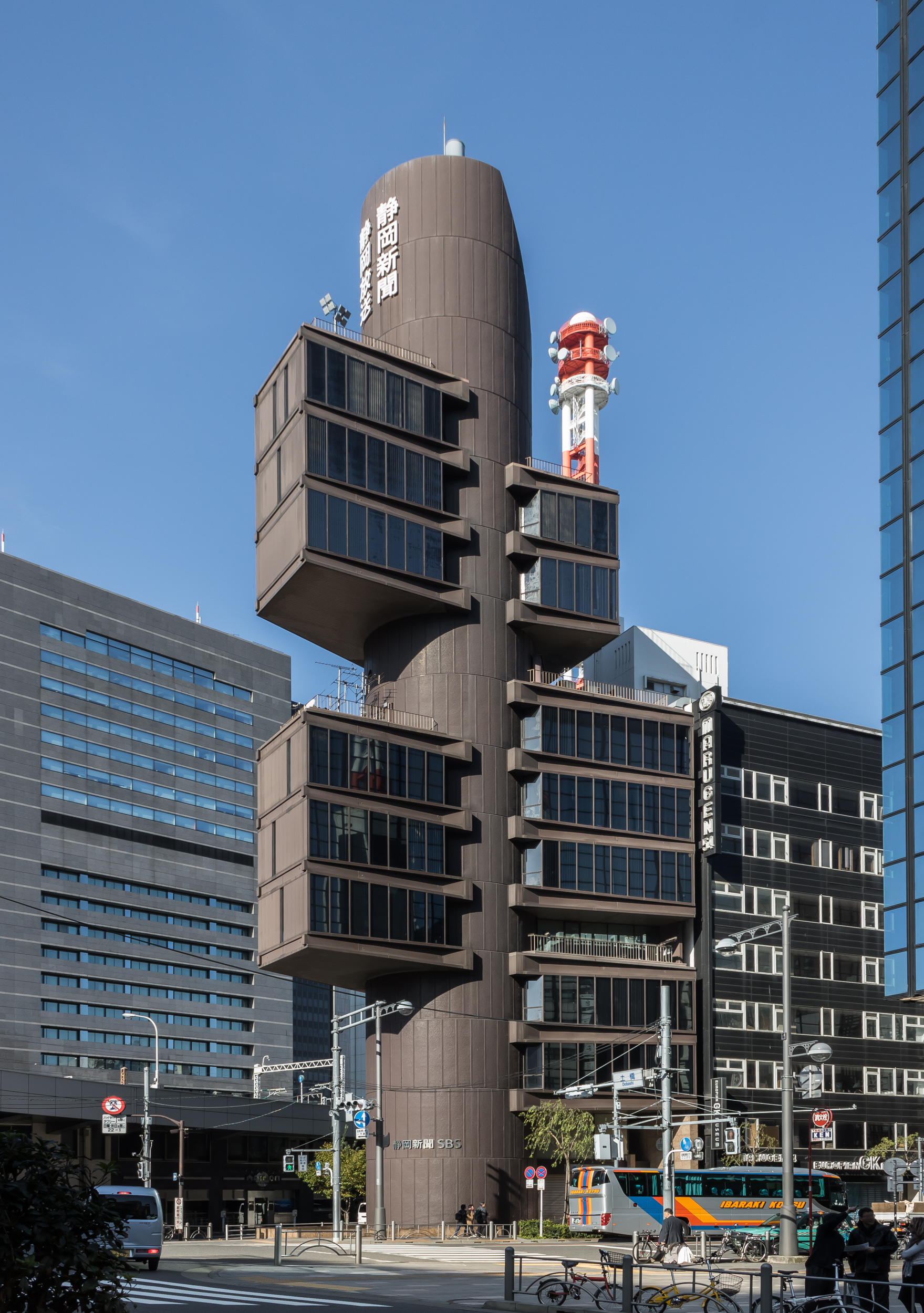 静岡新聞・静岡放送東京支社ビル。丹下健三設計。